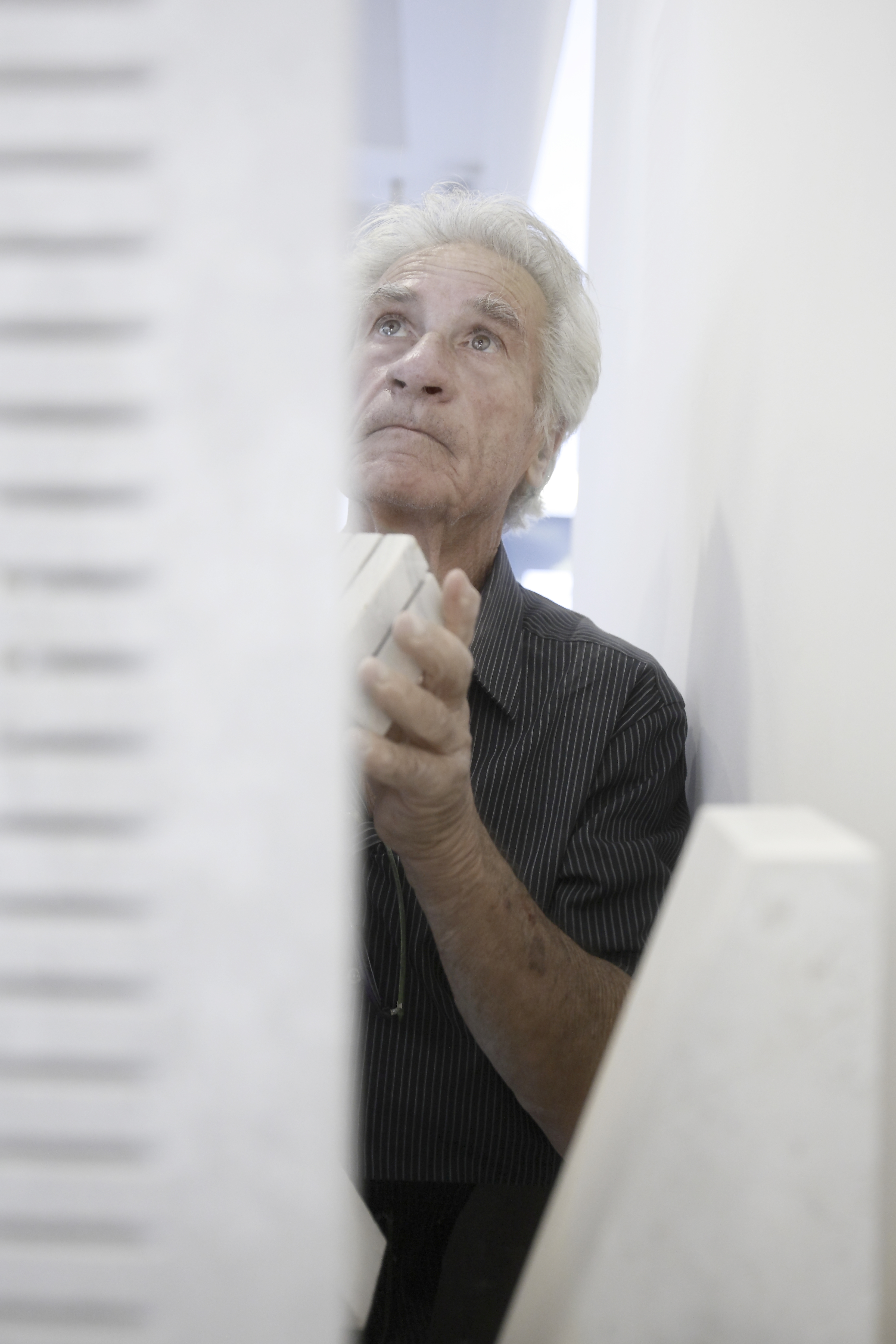 durante la Turandot ph SardiniaFashion